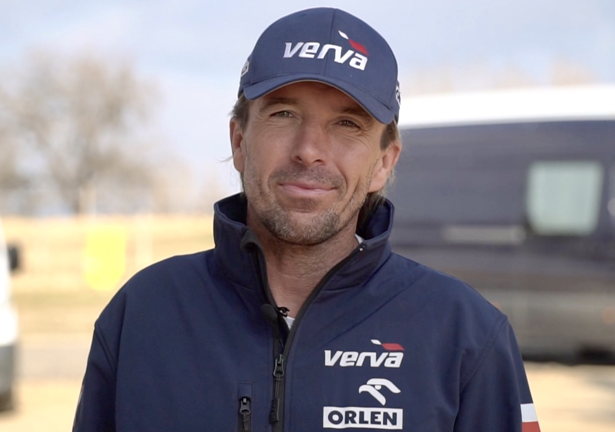 Marek Dąbrowski